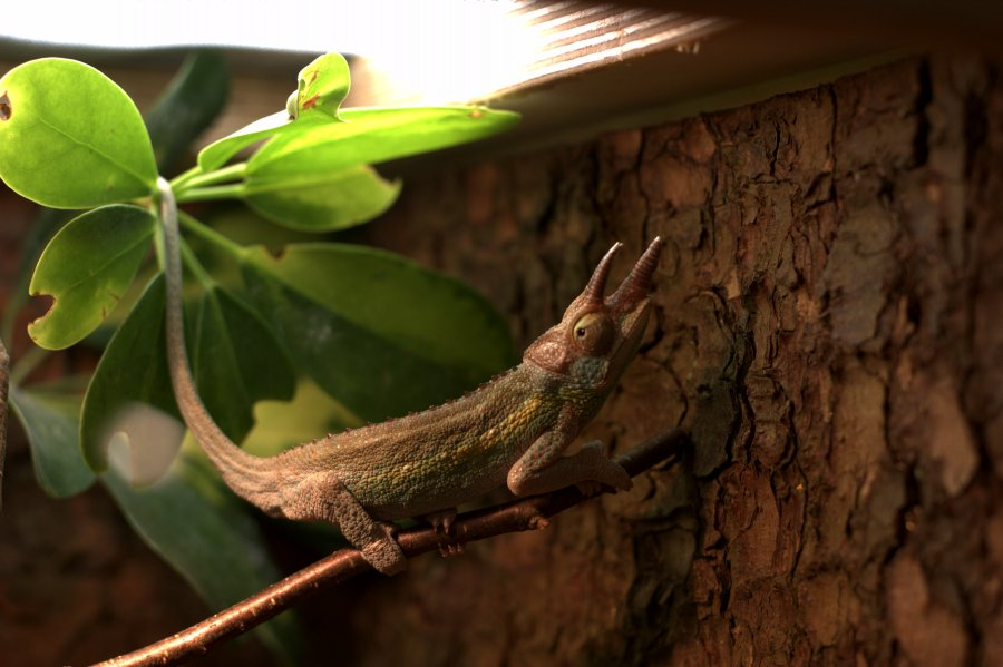 Chamäleon jacksonii ssp.